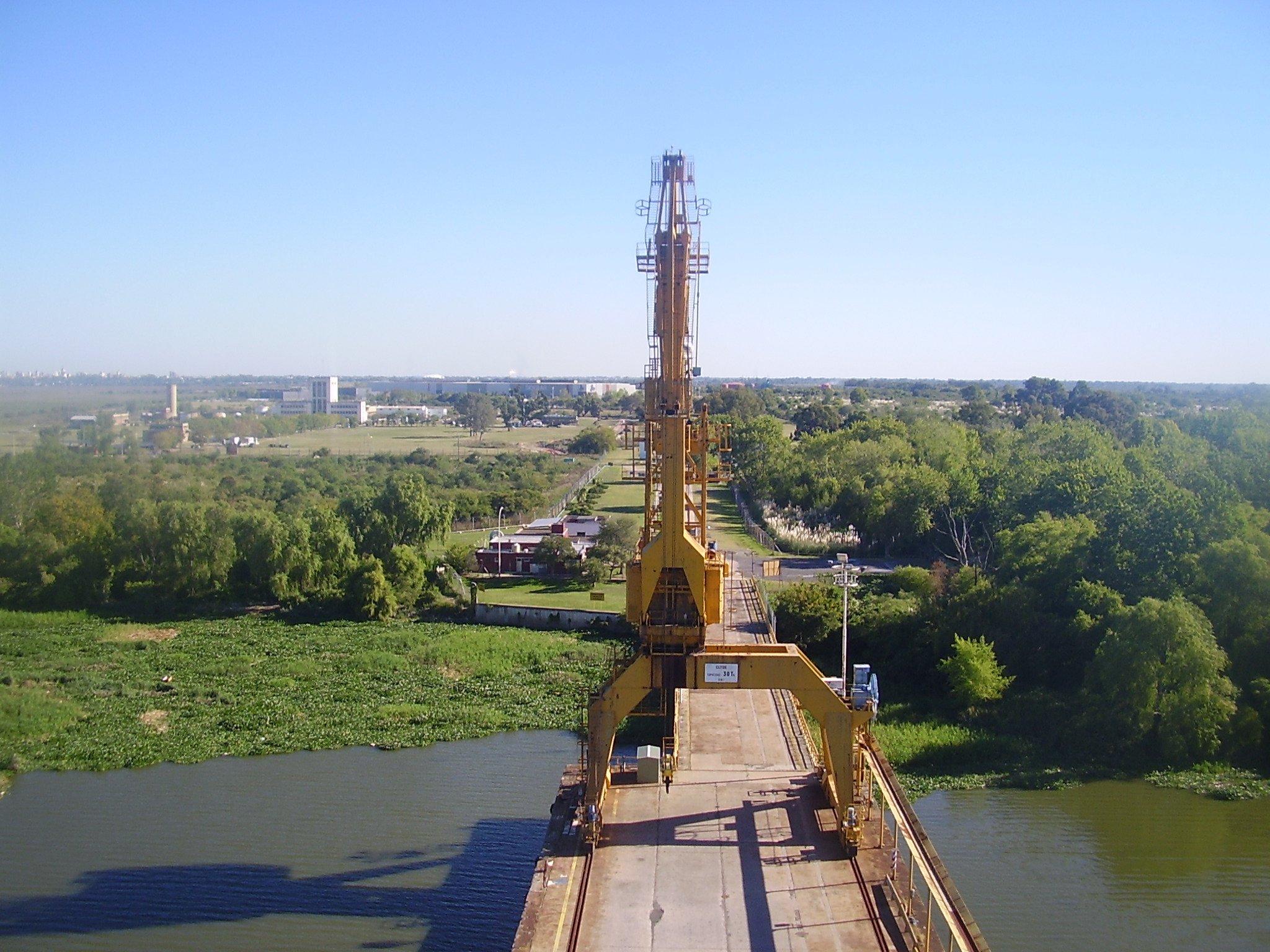 Vista general del Puerto Ing. Rocca - Grúa Clyde 30 tons